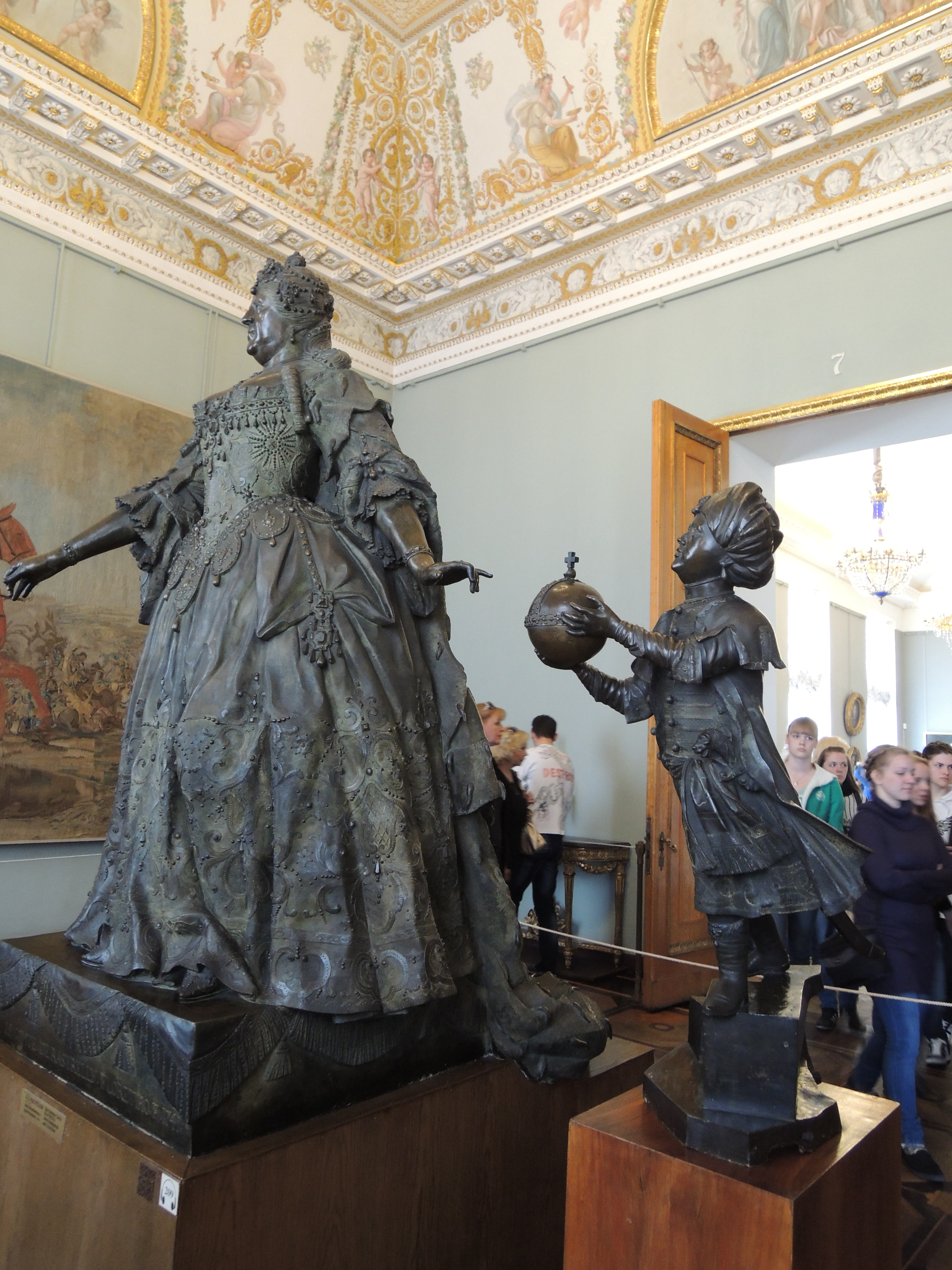 Карло Растрелли. «Анна Иоанновна с арапчонком», 1741. ГРМ